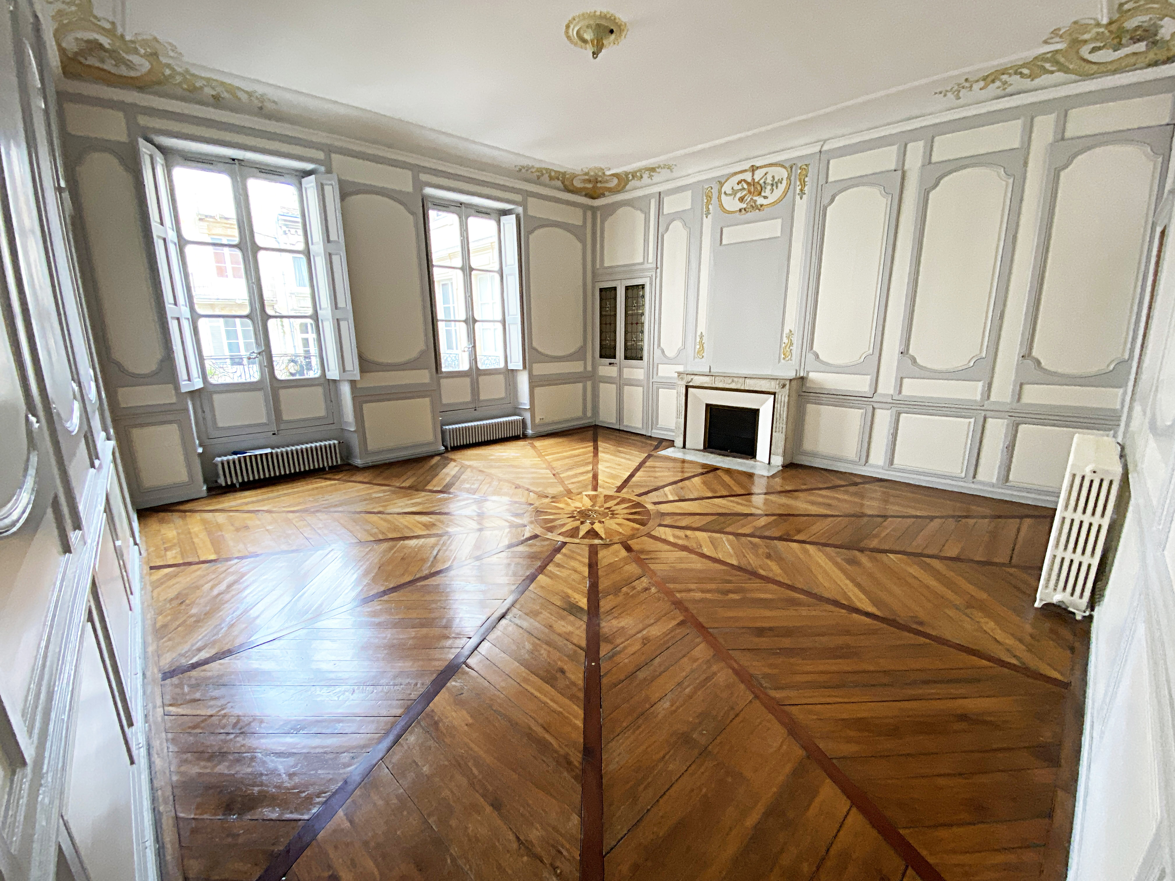 Salon à l'étage noble de l'Hôtel Copmartin avec ses boiseries, son manteau de cheminée et son parquet à rosace d'époque Louis XVI